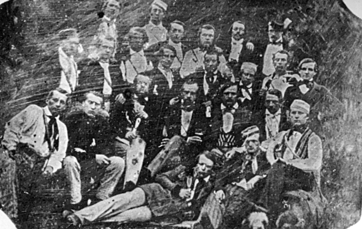 Zwanzigstes Stiftungsfest Corps Rhenania im Garten des "Reichsadler" (Daguerreotypie)